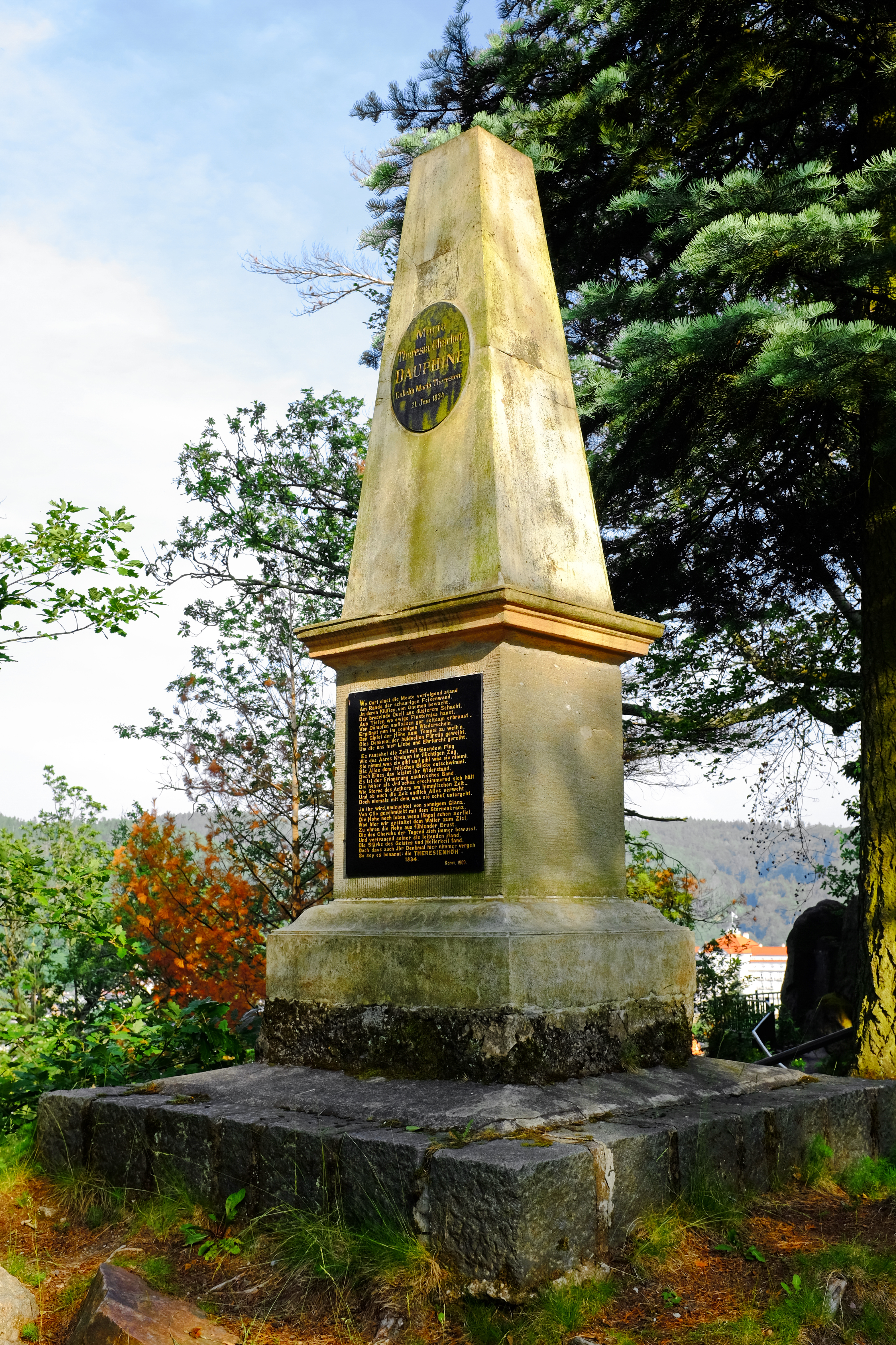 Karlovy Vary vyhlídka Petra Velikého pomník Marie Terezie Bourbonské